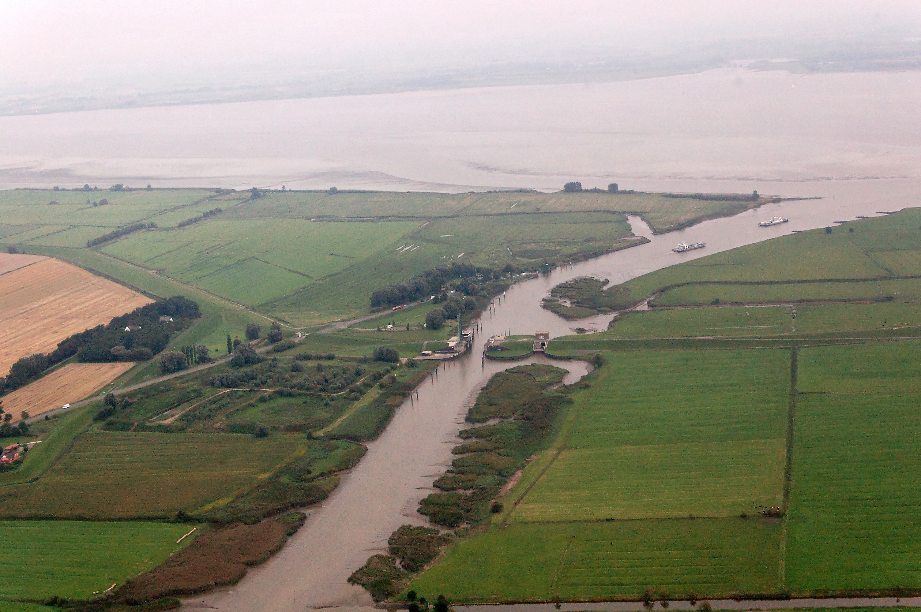 Impressionen Fotoflüge September 2011 (CPB); Wischhafener Süderelbe zwischen Wischhafen (links) und Drochtersen-Krautsand (rechts), Landkreis Stade, Niedersachsen, Deutschland; etwa in der Bildmitte das Sperrwerk Wischhafen, dahinter der Fähranleger Wischhafen, im Hintergrund die Elbe und das Elbufer in Schleswig-Holstein mit Glückstadt (rechts oben) Dieses Foto entstand aufgrund eines Projektes, das von Wikimedia Deutschland e. V. gefördert wurde. Im Rahmen des „Community-Projektbudgets“ sollen Luftbilder u.a. von Inseln, Halligen, Sanden und Küstenstädten der deutschen Nordseeküste angefertigt werden. Das Projekt „Fotoflüge“ wurde im September 2011 begonnen.